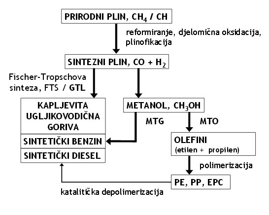 Dobivanje sintetskih goriva i baznih ulja GTL, CTL i BTL tehnologijama, prof. dr. sc. Ante Jukić